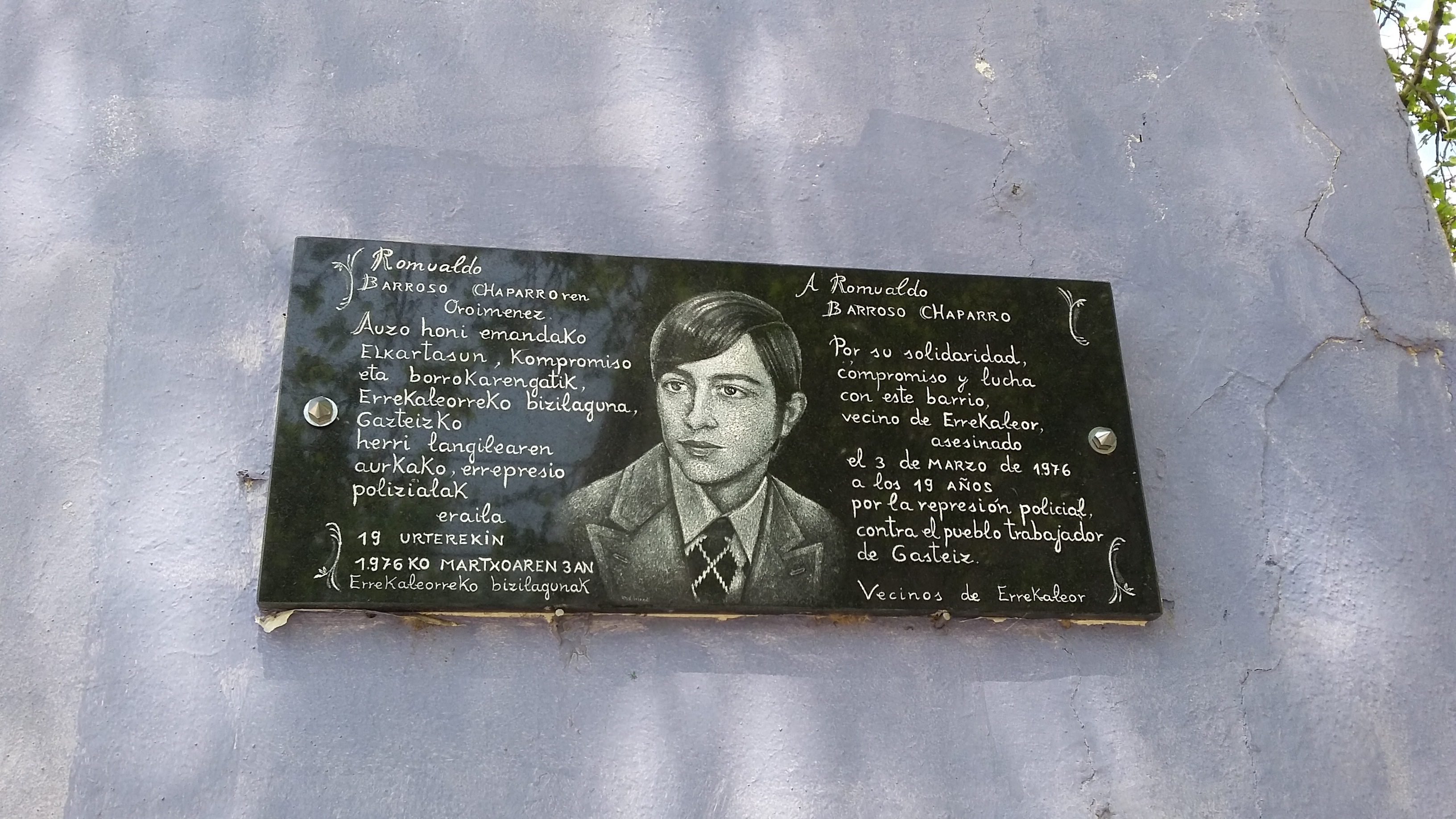 Placa homenaje a Romualdo Barroso Chaparro asesinado por la policía armada española el 3 de marzo de 1976 en los llamados "Sucesos de Vitoria". Ubicada Errekaleor, barrio donde residía.